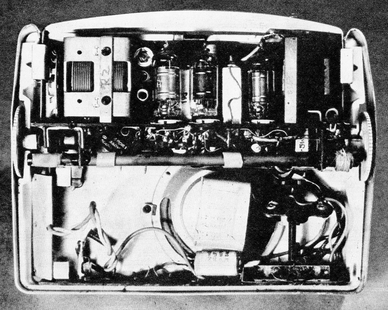 Radio Eltra 50 z 1973r.